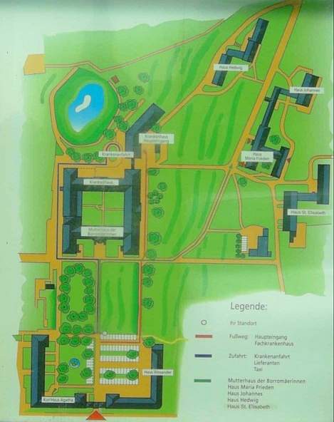 Plan des Klosters Grafschaft(Schmallenberg), Germany.